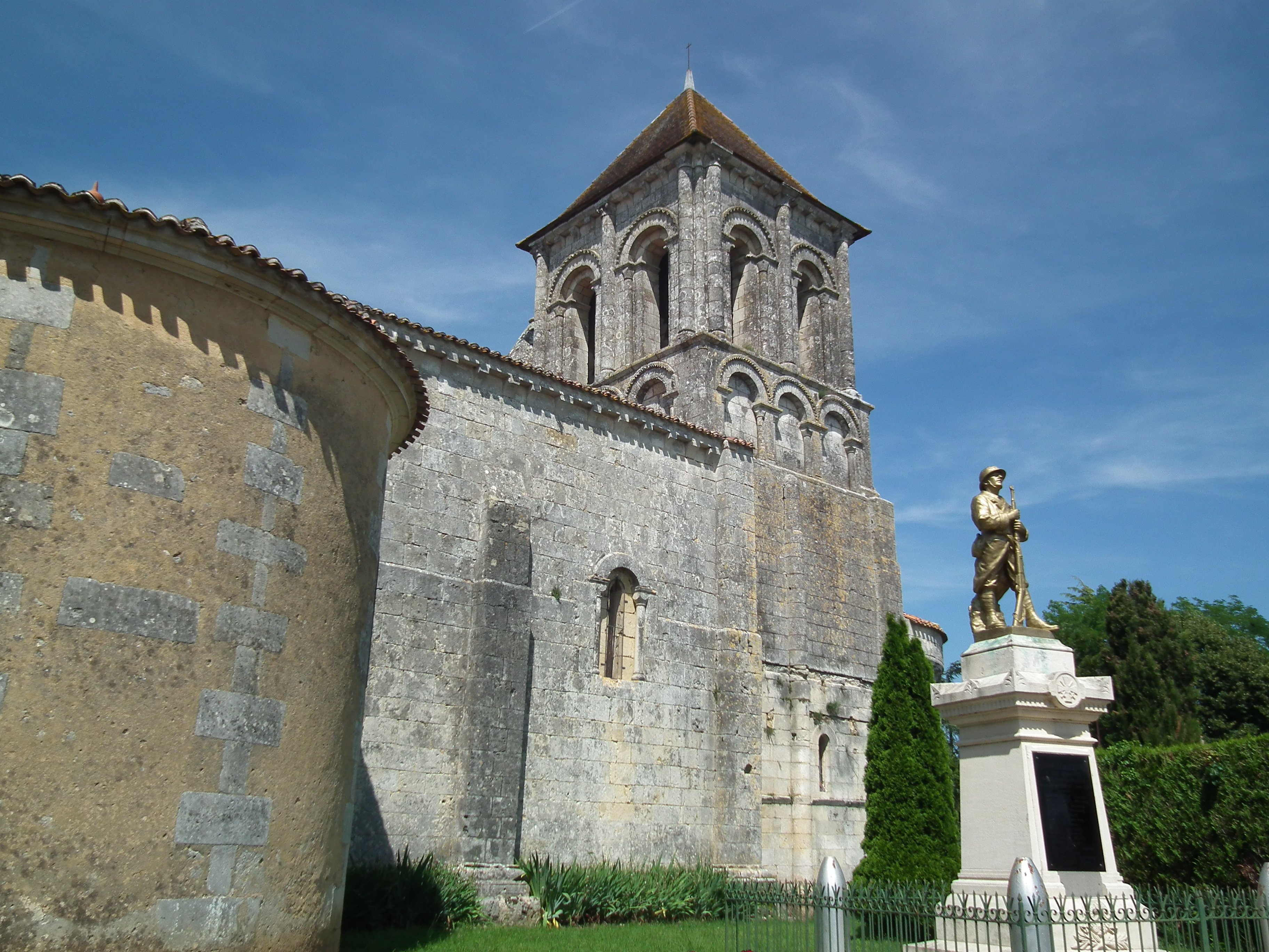 L'église et le monument aux morts de Jazennes